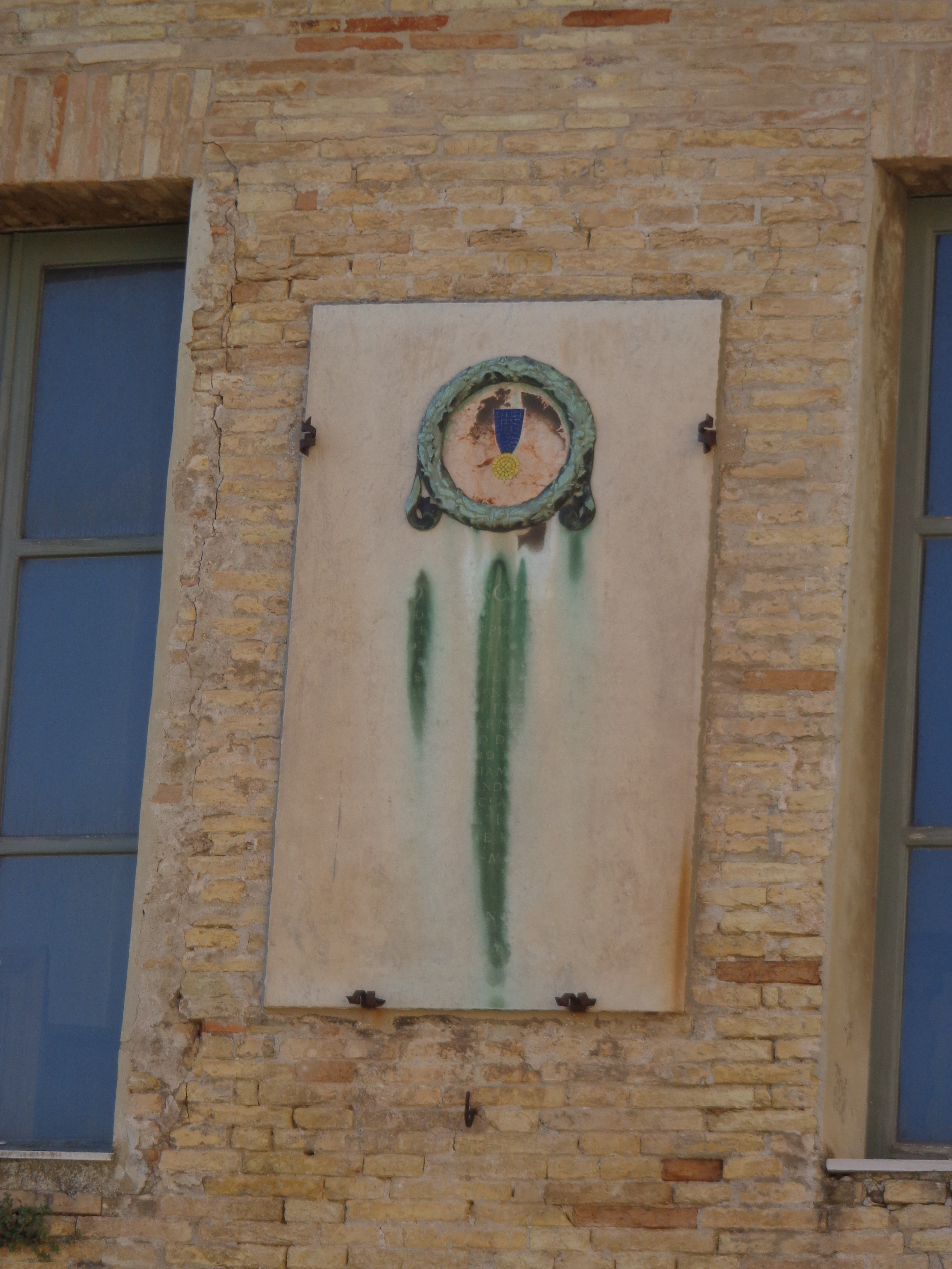 Palazzo degli Anziani. Targa a ricordo della Medaglia d'oro a Emilio Bianchi This is a photo of a monument which is part of cultural heritage of Italy.